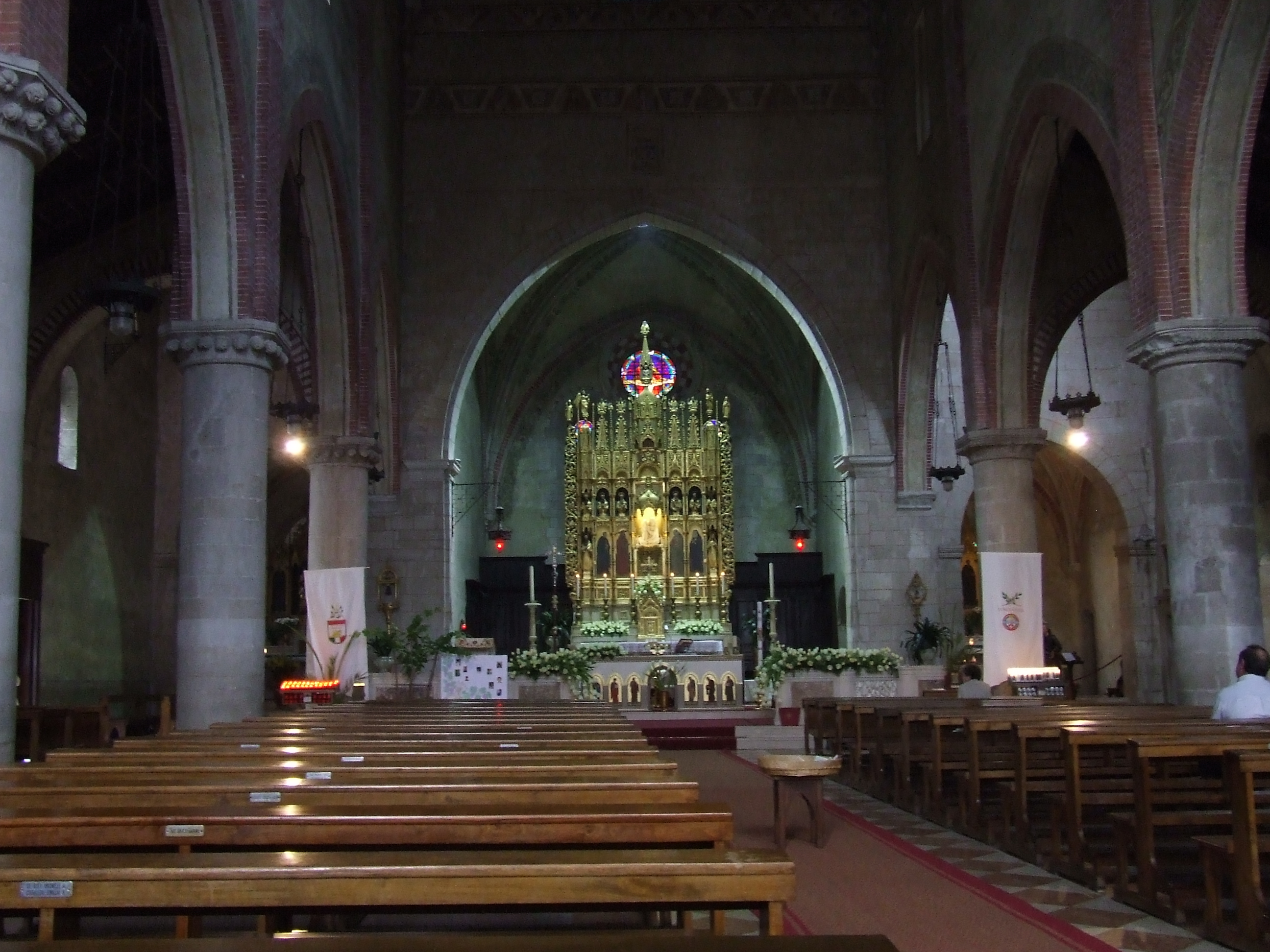 Luogo dei pensieri.